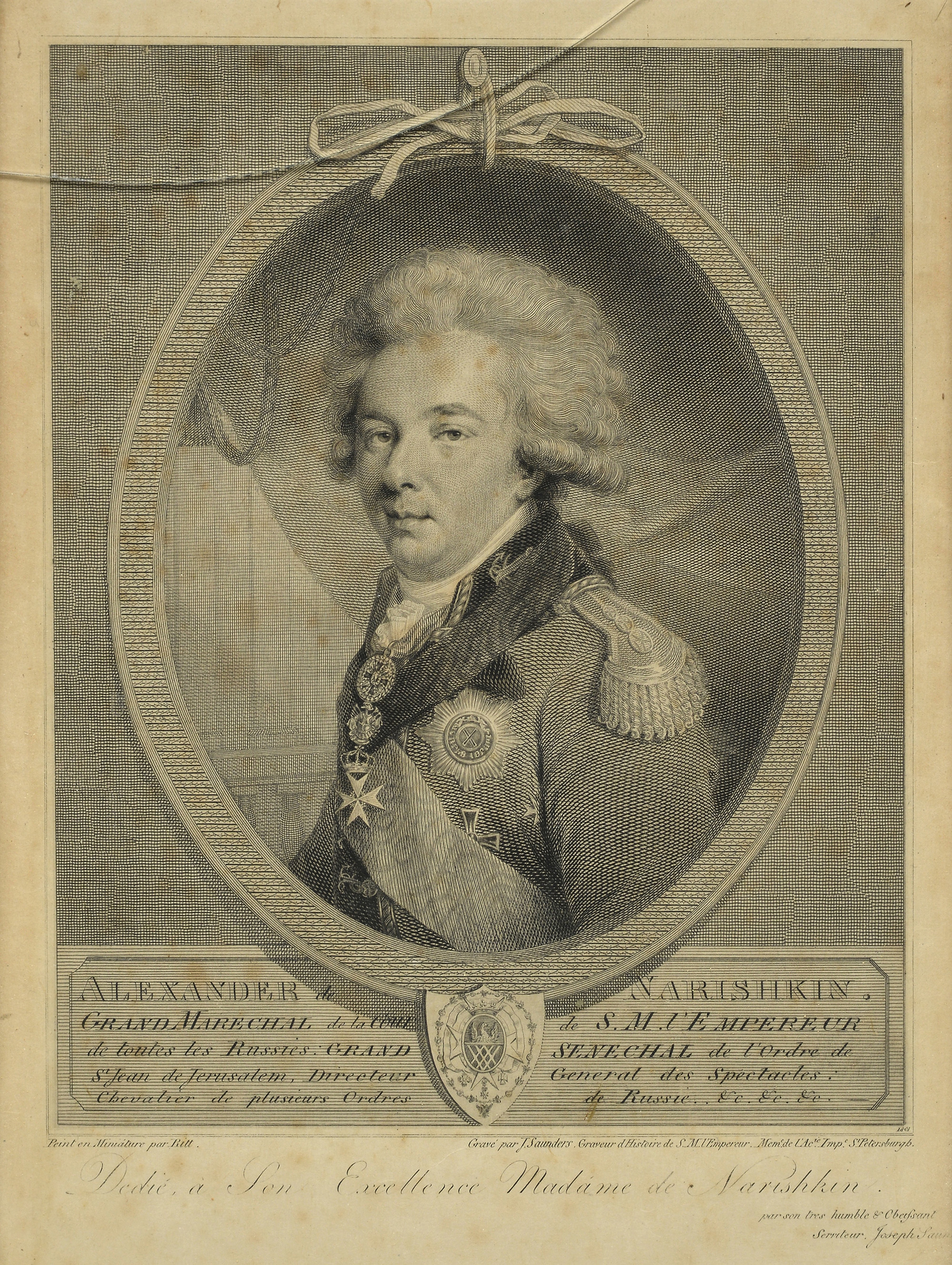 Саундерс Жозеф. Портрет директора императорских театров Александра Львовича Нарышкина Provenance: Cyrille et Vera Narychkine, gravure située dans le boudoir et le grand salon de la Villa Narischkine à Biarritz